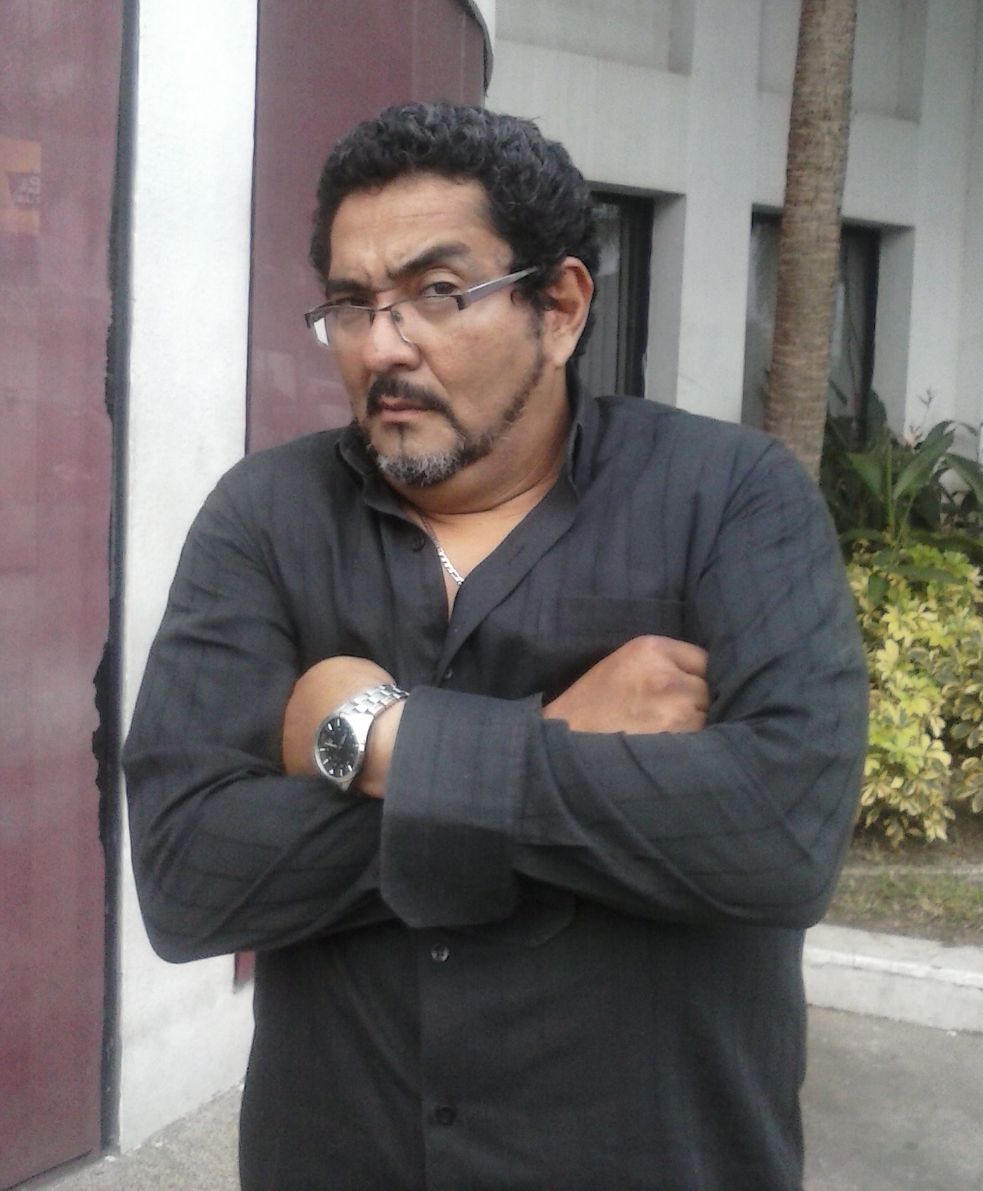 Andrés Garzón en las instalaciones de GamaTV, en 2014.